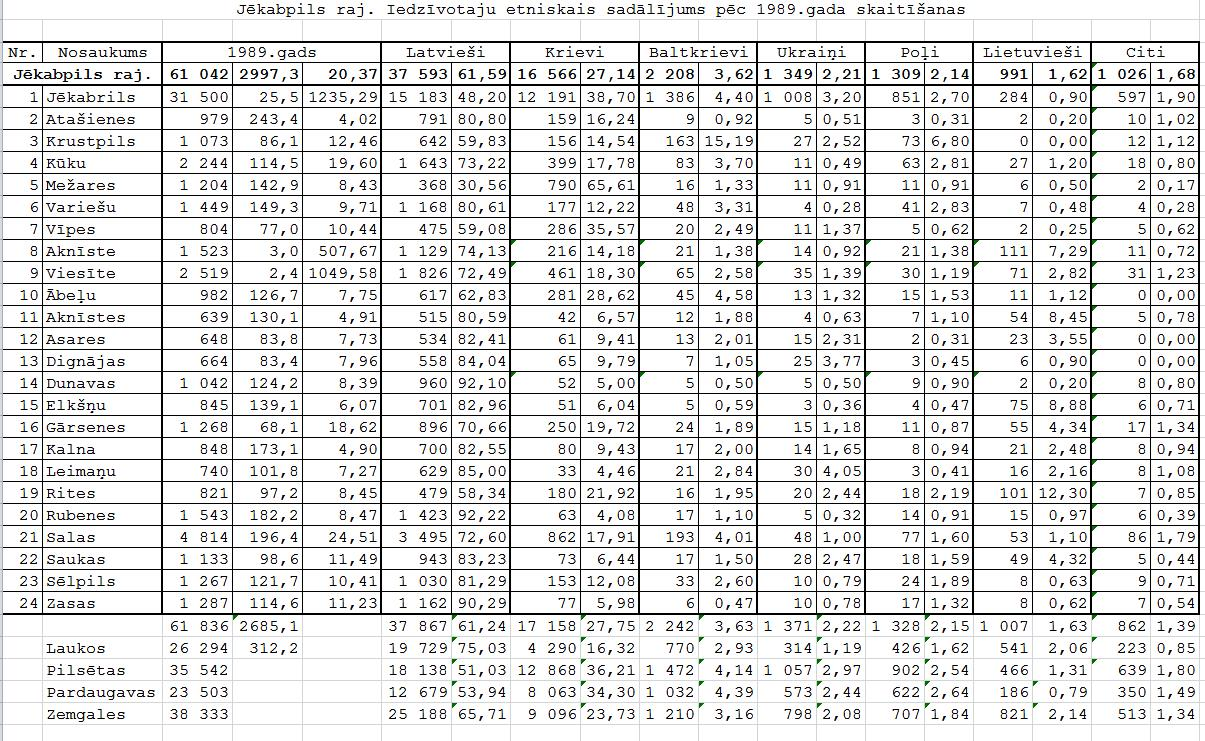 Этнический состав населения Латвии по переписи 1989 года